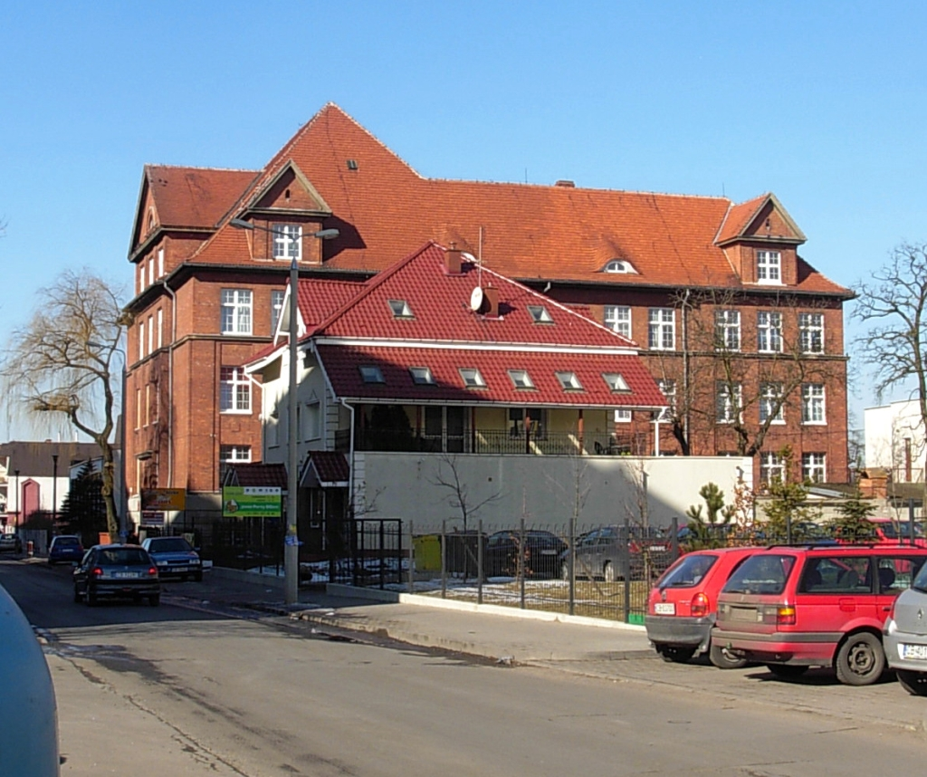 Budynek II LO w Bydgoszczy